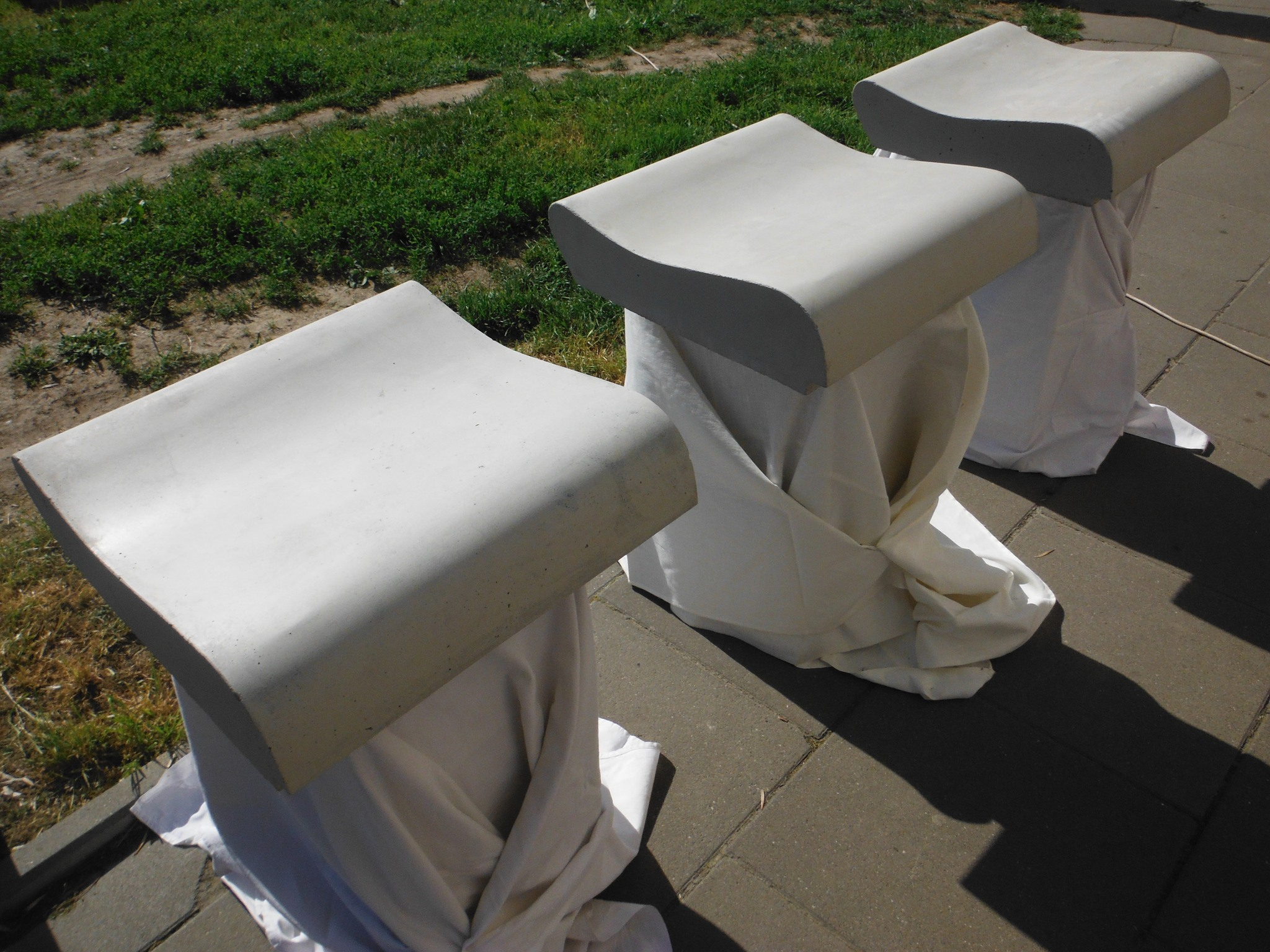 Prezentacja betonowych siedzisk ław w czasie tzw. Święta Saskiej Kępy (24 maja 2014).